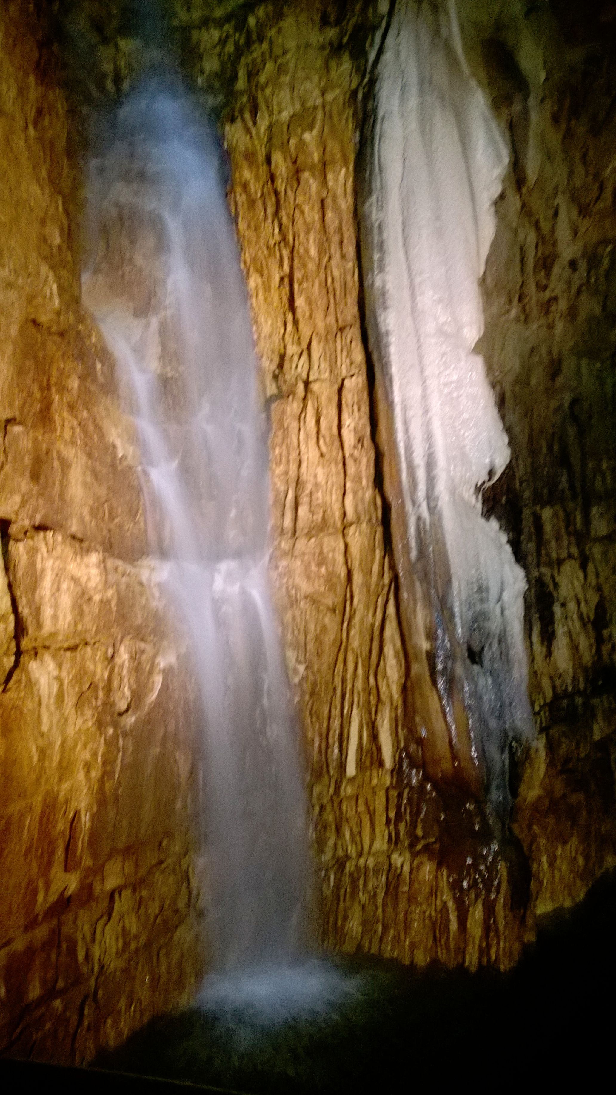 Grotte di Stiffe 2015